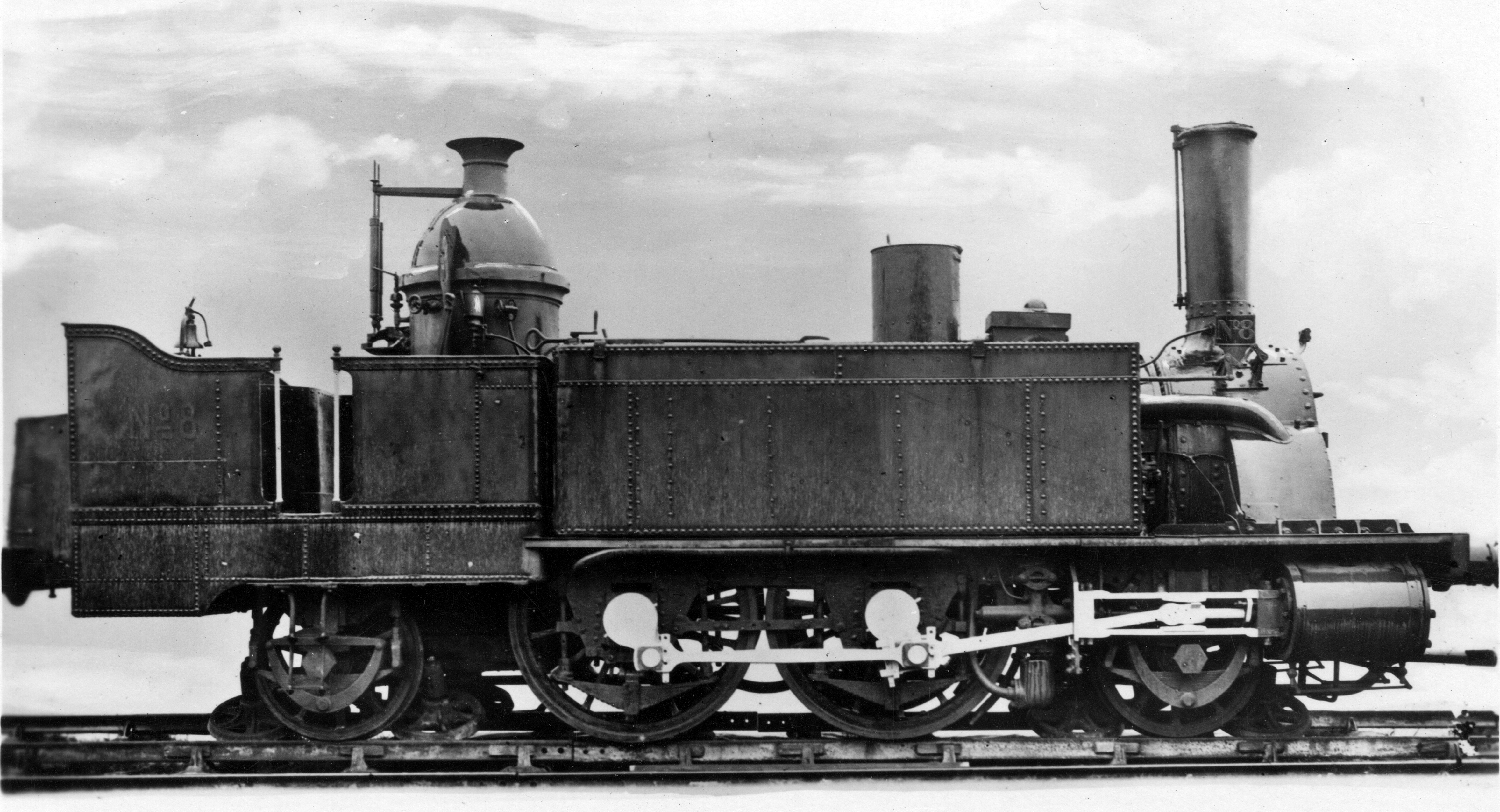 Locomotive sytème Arnoux, voie de 1.675, construite par Anjubault à Paris pour la compagnie d'Orsay. Mise en service en 1855 et modifiée en 1867, ex-ligne de Sceaux, elle porte le n°8 de la compagnie d'Orléans.